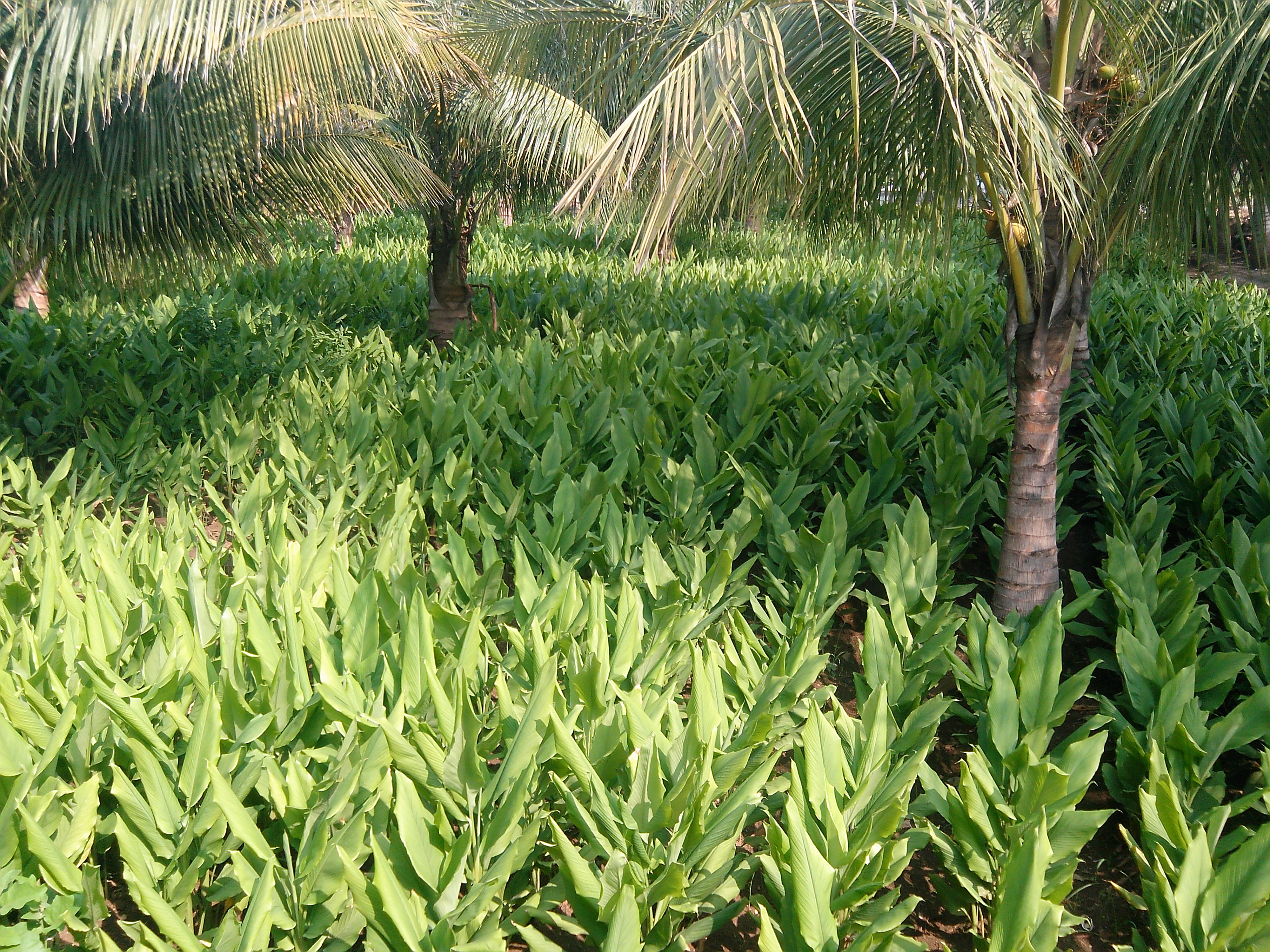 தென்னந்தோப்பில் ஊடுபயிராக மஞ்சள் பயிர்.சேலம், மாவட்டம், தமிழ் நாடு, இந்திய ஒன்றியம்.